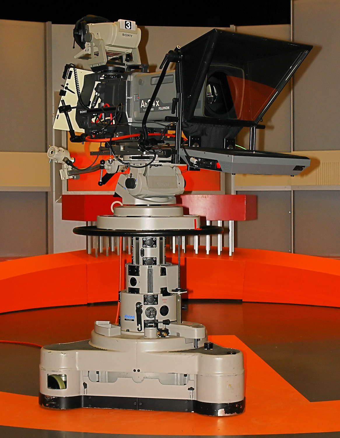 Radio Bremen in Bremen, Weserhaus. Studiokamera mit Teleprompter